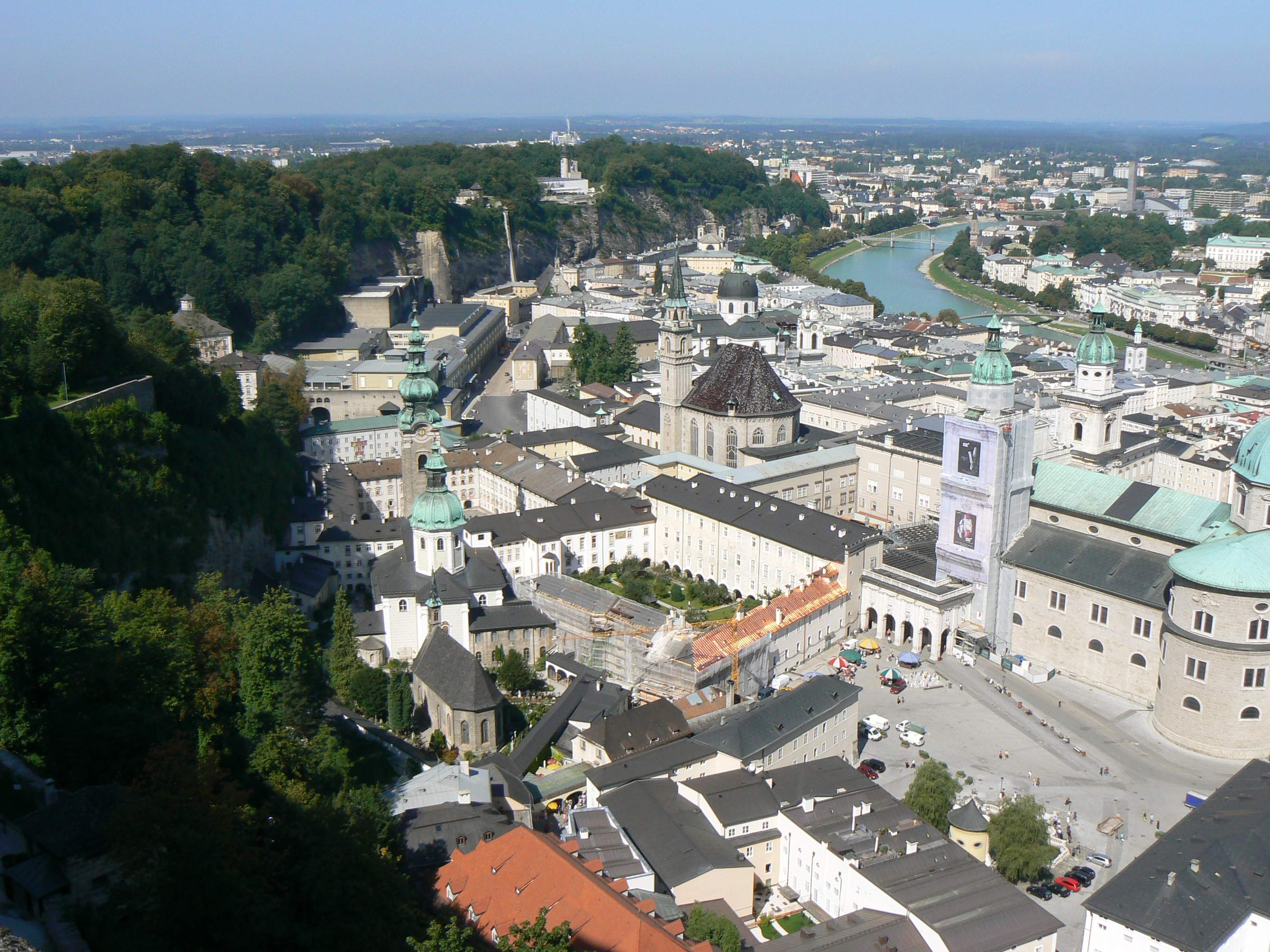 Blick von der Festung Hohensalzburg auf die Altsdtadt; aufgenommen ca. 2006